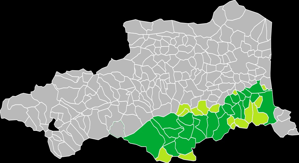 Mapa de les comunes de la Conca del Tet, fet a partir d'un altre mapa de lliure accés